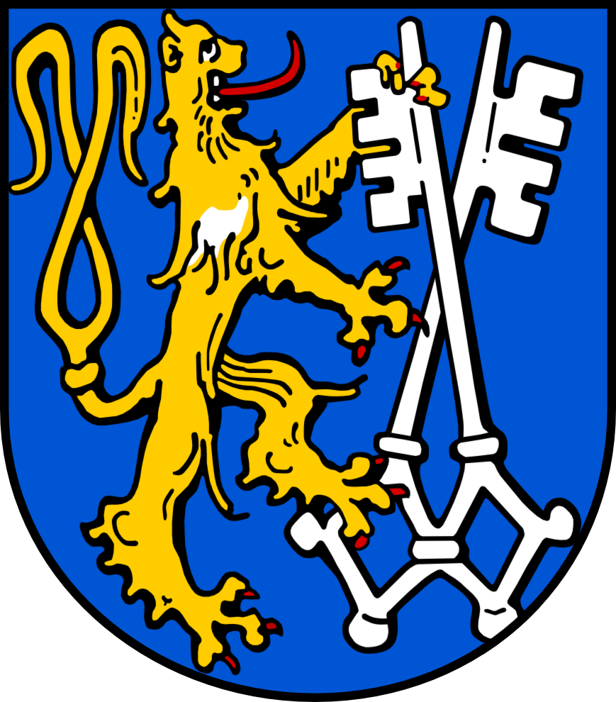 Das Wappen der Stadt Liegnitz. Schläsch: Doas Woappa der Stoadt Liegnz.